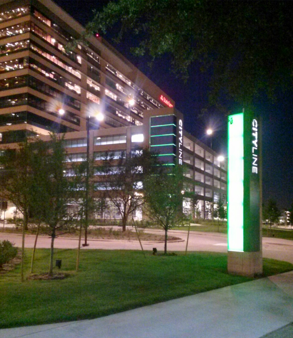 Imagen de noche de la futura microciudad CityLine. Donde habitarán los línea-urbanitas.